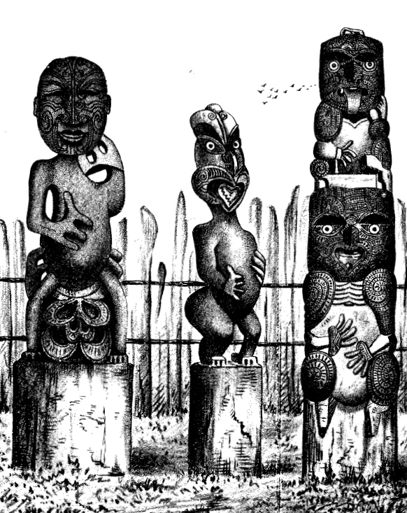 Māori tiki (whakapakoko), New Zealand, 19th century